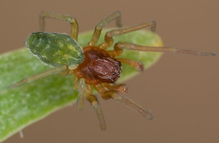 Nigma walckenaeri, adult male